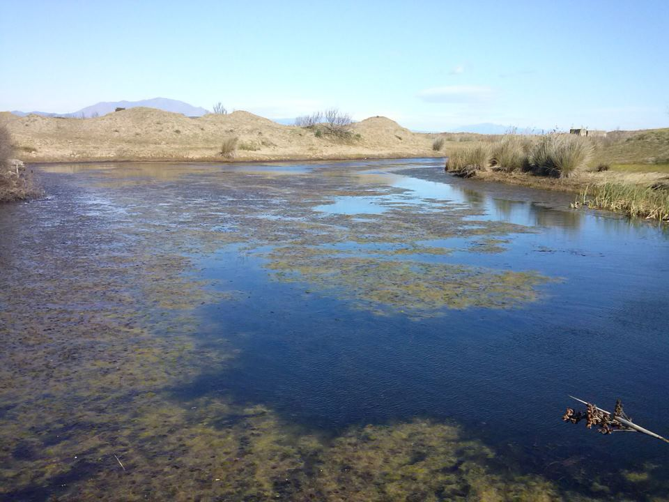 estuario guadalquiton